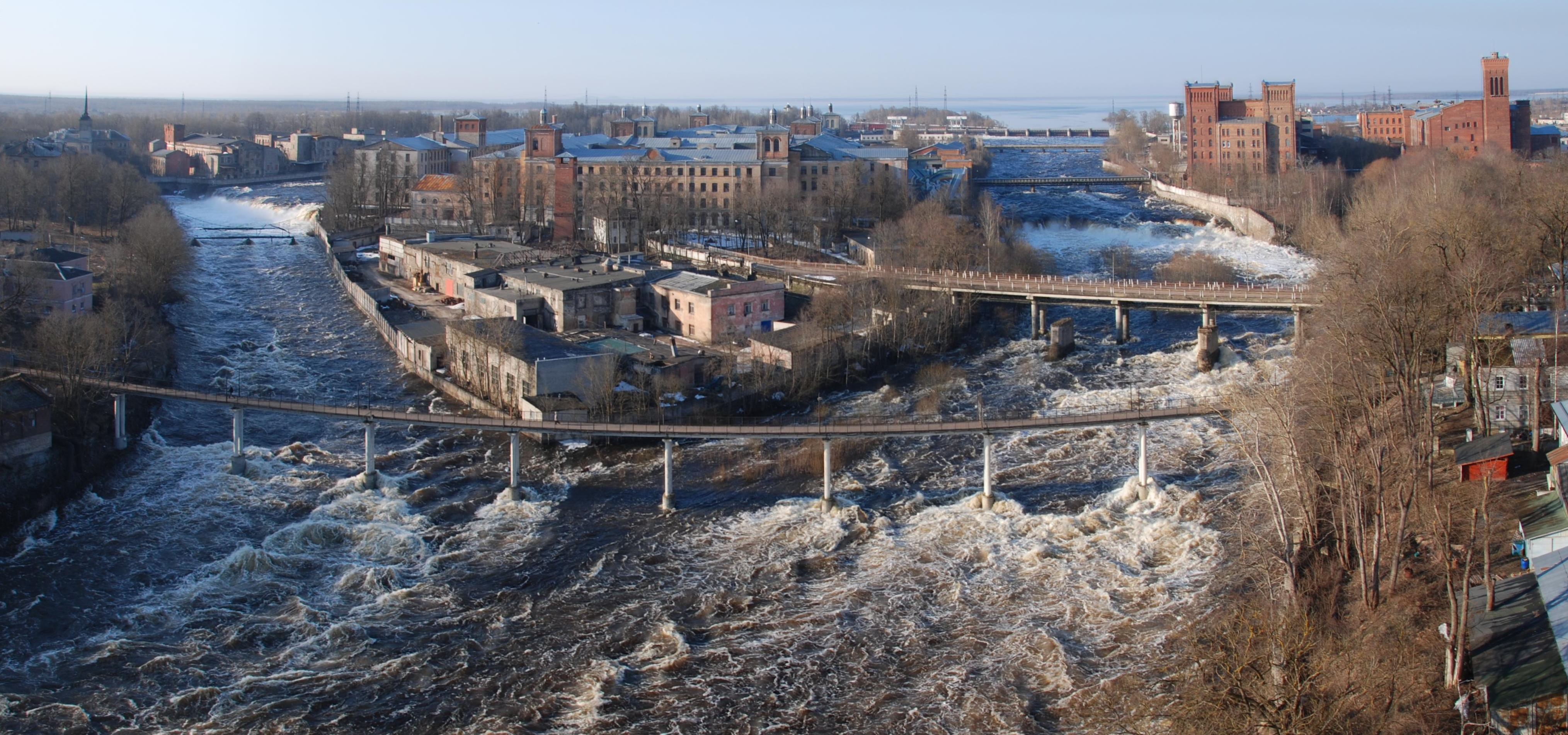 Narva jõe kanjoni maastikukaitseala, tänu kevadisele suurveele "töötavad" Narva joad taas.